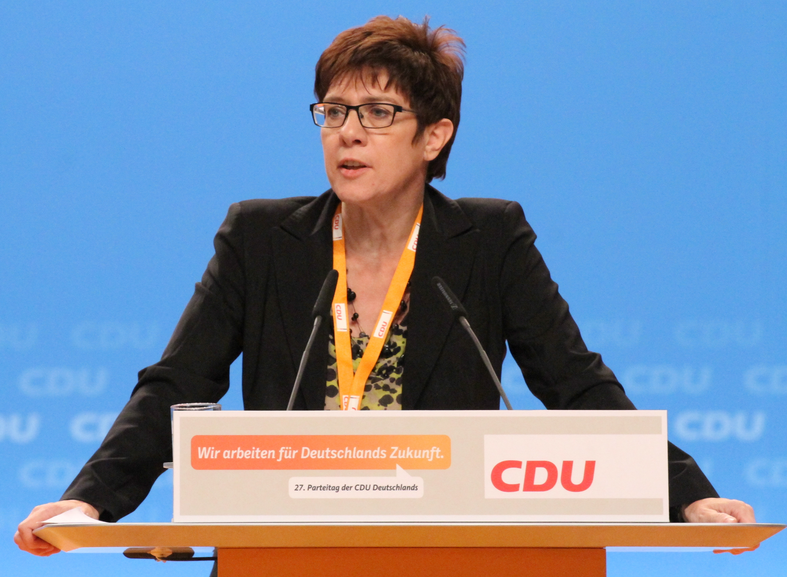 Annegret Kramp-Karrenbauer auf dem CDU Bundesparteitag Dezember 2014 in Köln